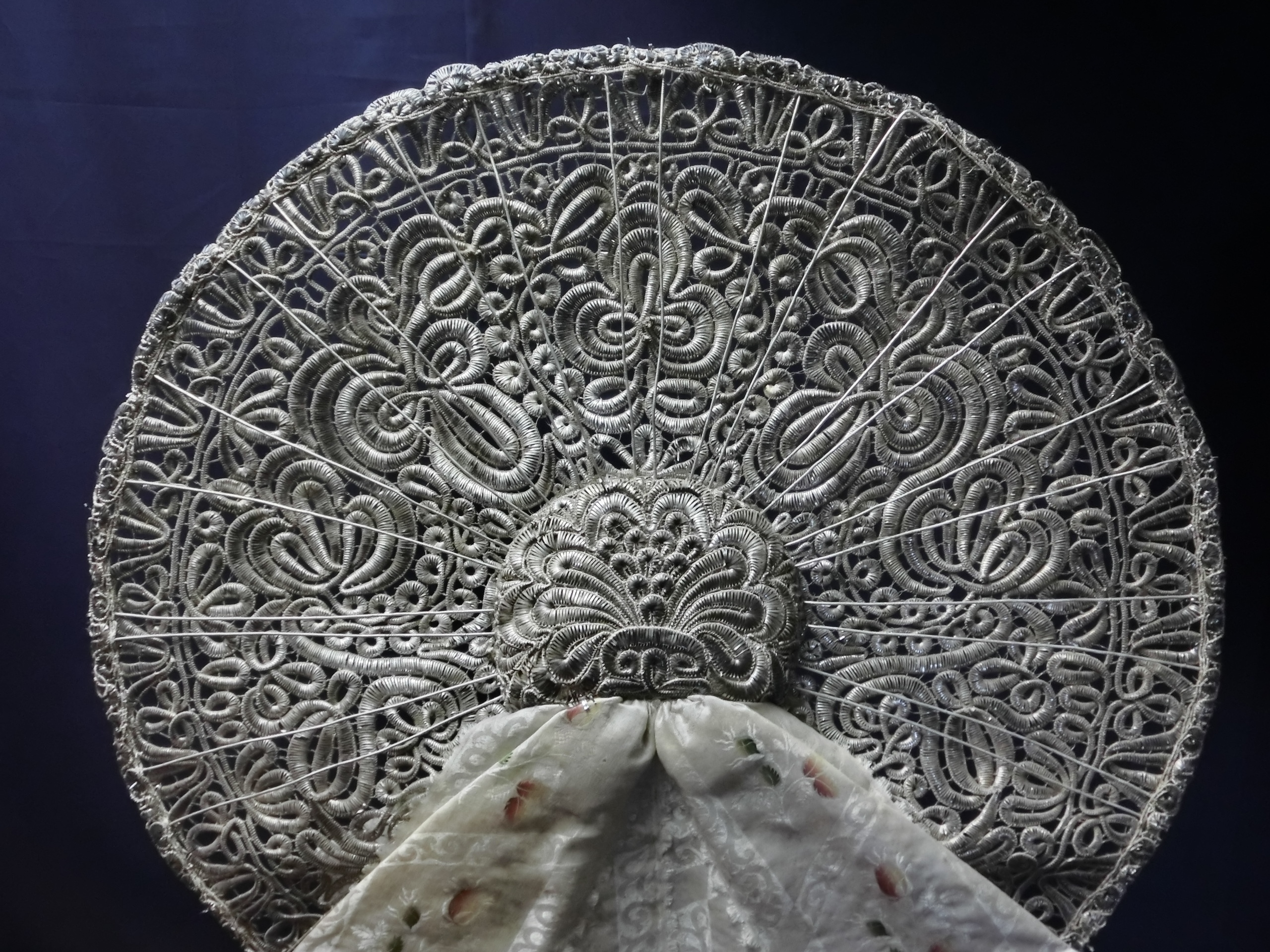 Deutschland - Baden-Württemberg - Landkreis Biberach - Bad Schussenried, Ausstellungsstück im Oberschwäbischen Museumsdorf Kürnbach: Radhaube, Oberschwaben, 1800/1850